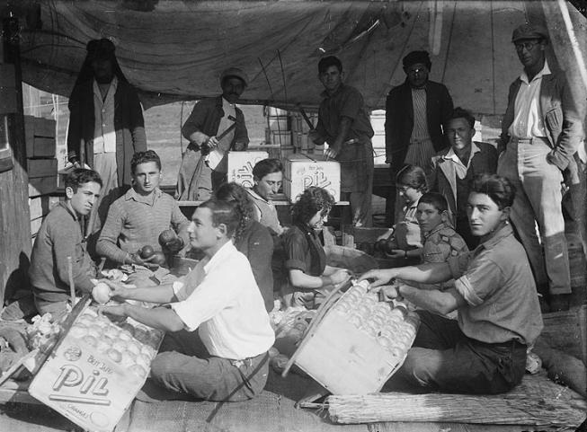 בית אריזה , אריזה ידנית